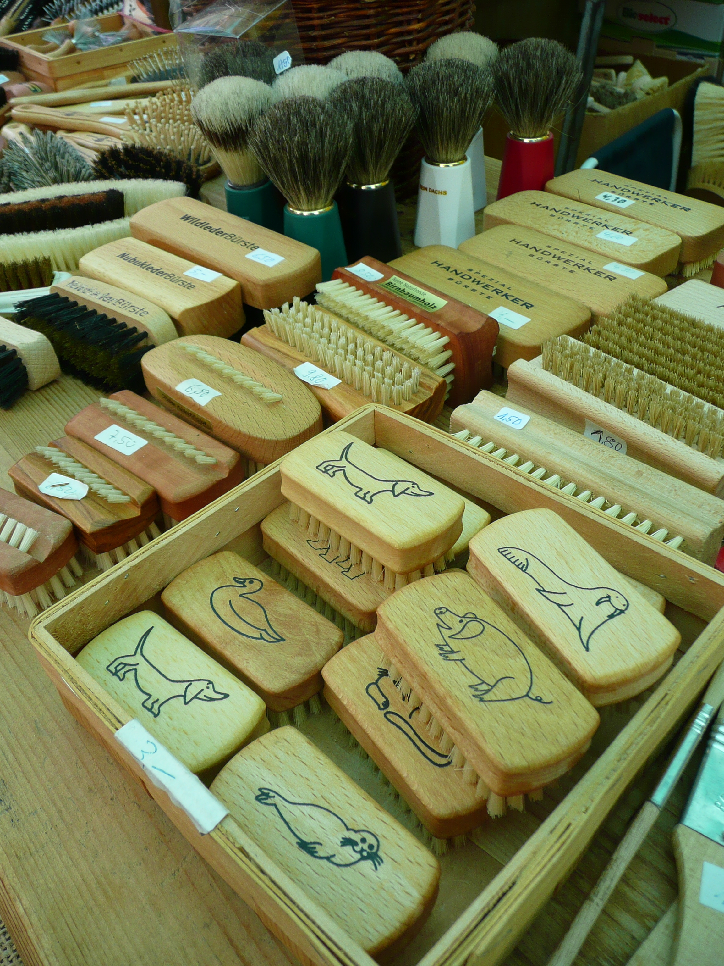 In Handarbeit hergestellte Bürsten (Handbürsten, Gemüsebürsten, Wildlederbürsten ...) und Rasierpinsel